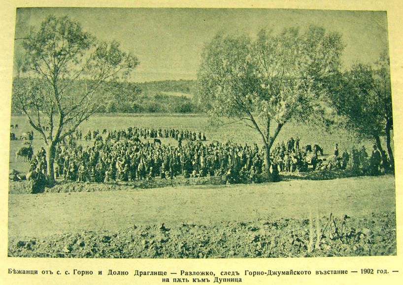 Бежанци от Горно и Долно Драглища след Горноджумайското въстание в 1902 година